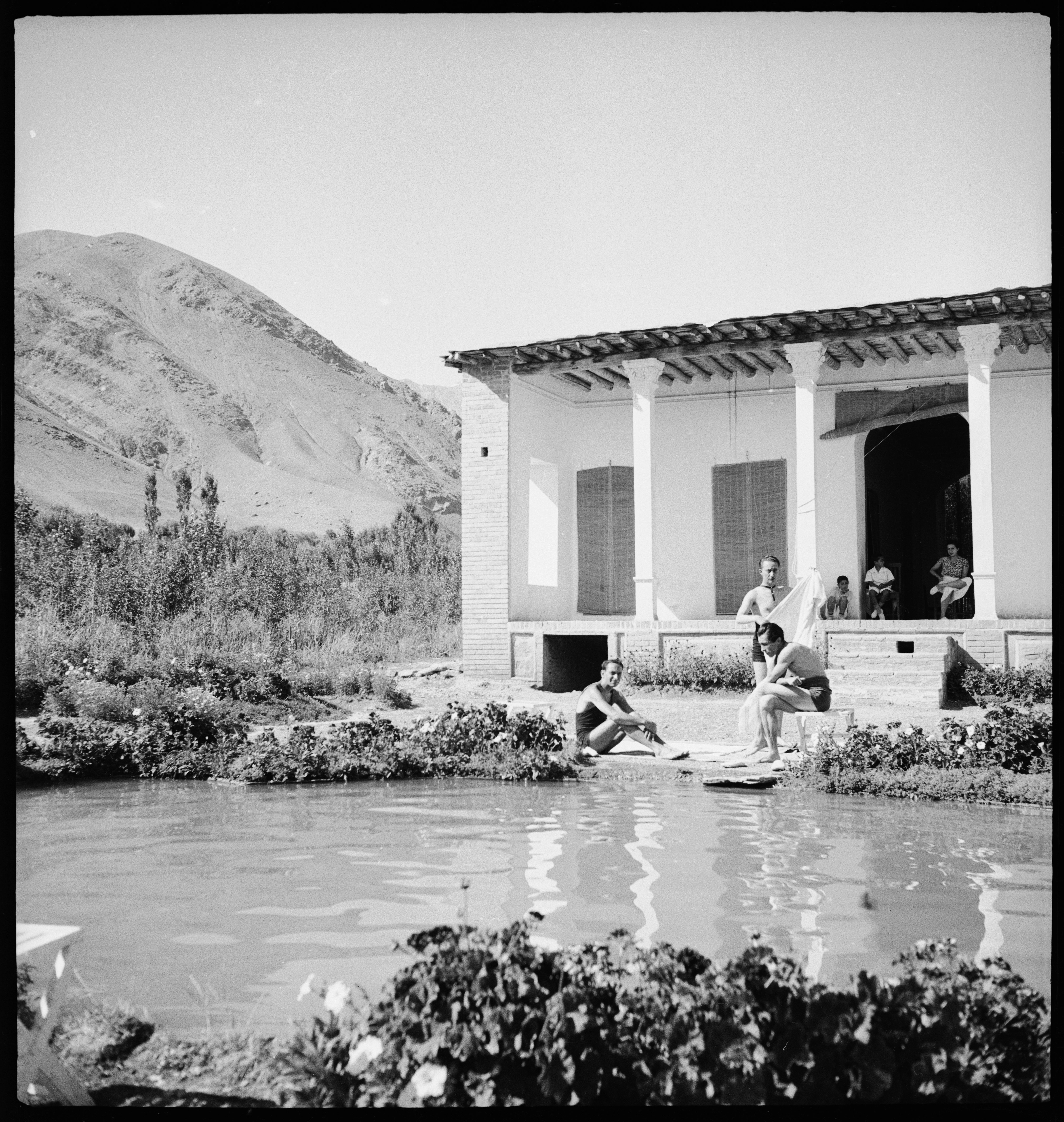 Persien, Farmanieh (Farmaniye): Menschen (Lokalisierung unsicher); Eine Gruppe von westlich aussehenden Menschen sitzen an einem Teich, im Hintergrund grosses weisses Gebäude